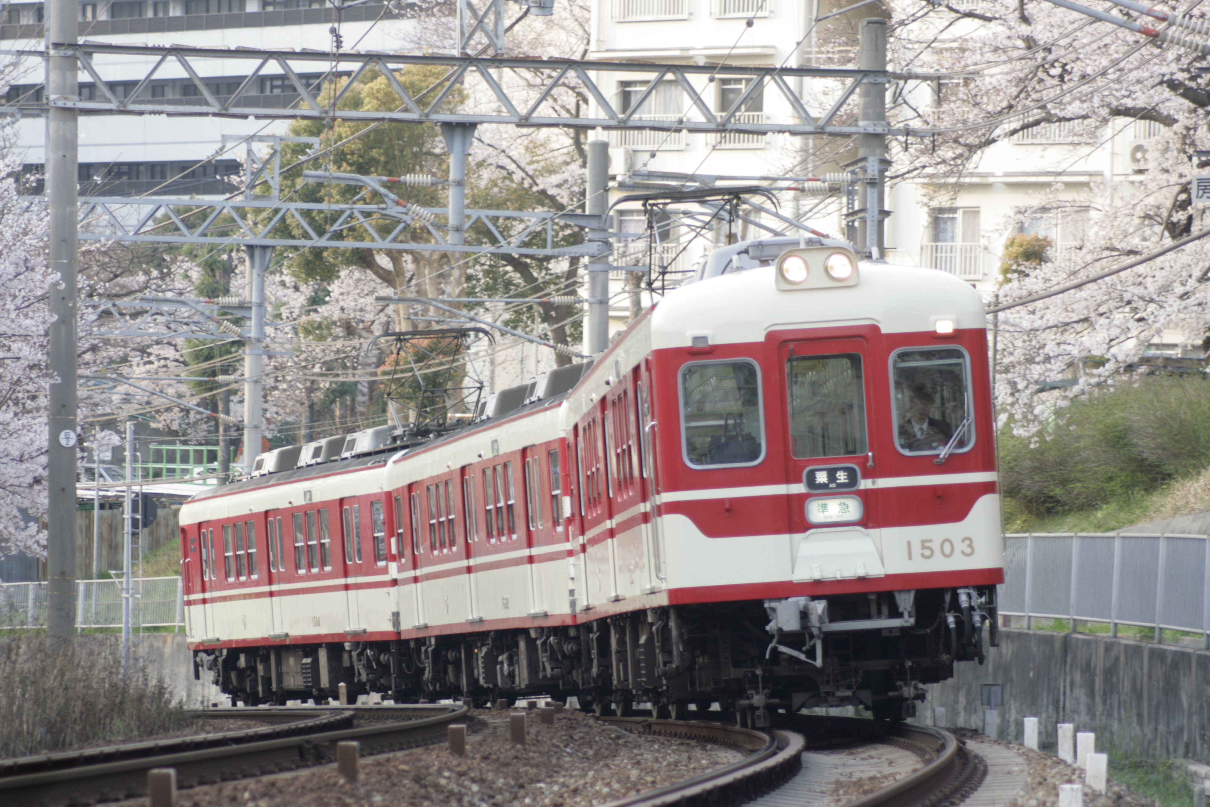 2019年4月6日 湊川～長田間にて撮影。